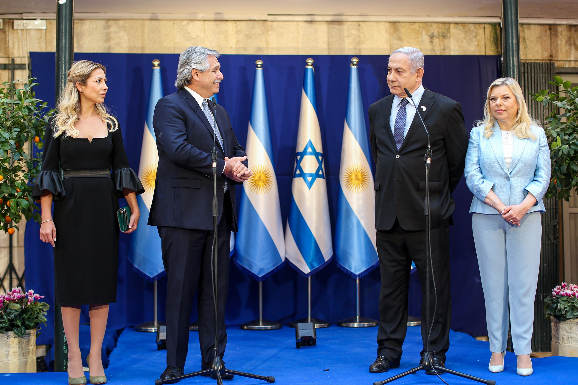 El presidente Alberto Fernández y el primer ministro de Israel, Benjamin Netanyahu, mantuvieron un encuentro esta mañana en Jerusalén y brindaron una declaración conjunta acompañados por sus respectivas esposas, Fabiola Yáñez y Sara Netanyahu.